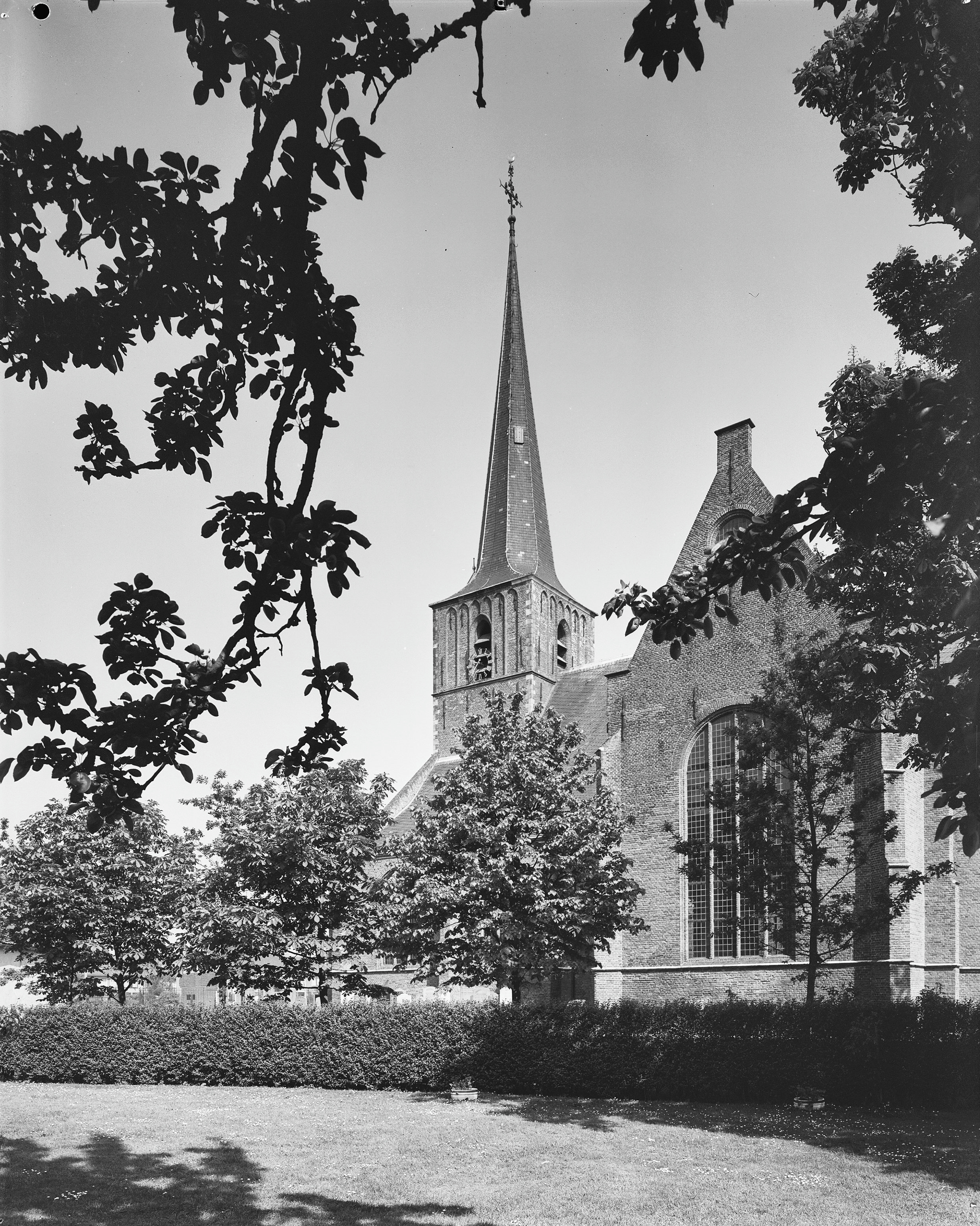 Nederlands Hervormde Kerk: gedeelte zuidertransept gevel en toren